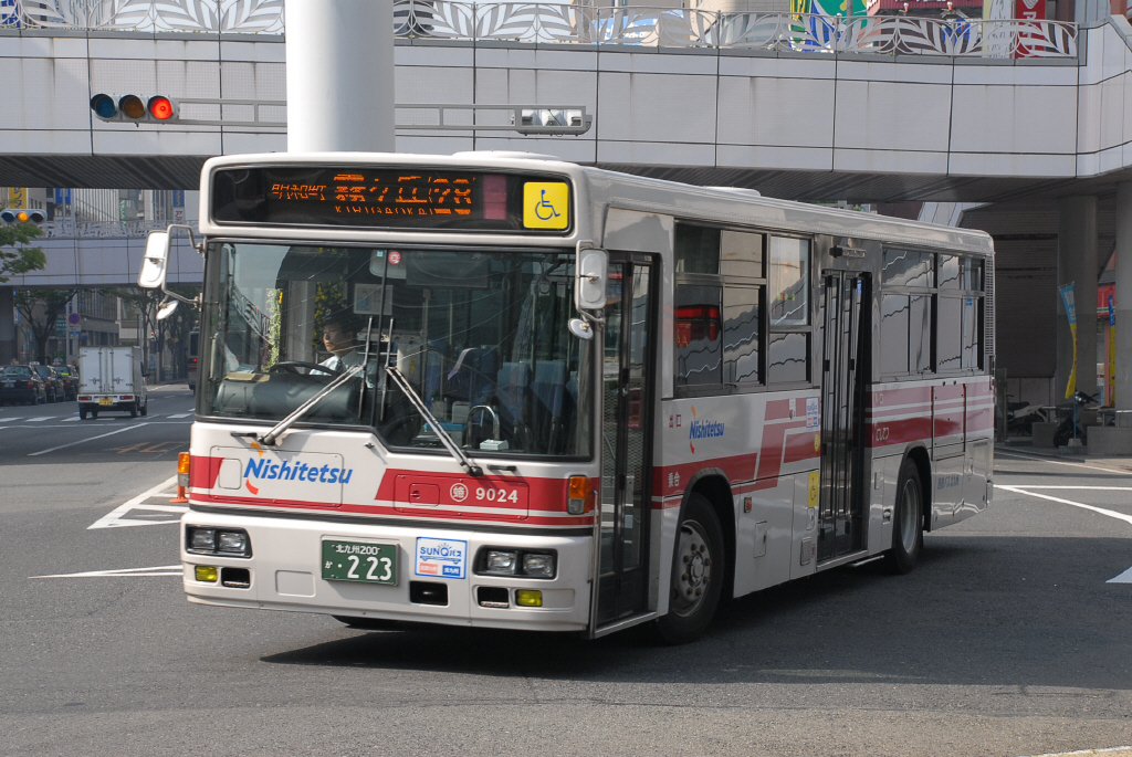 蜷田営業所時代 小倉駅前にて2008-5-1撮影